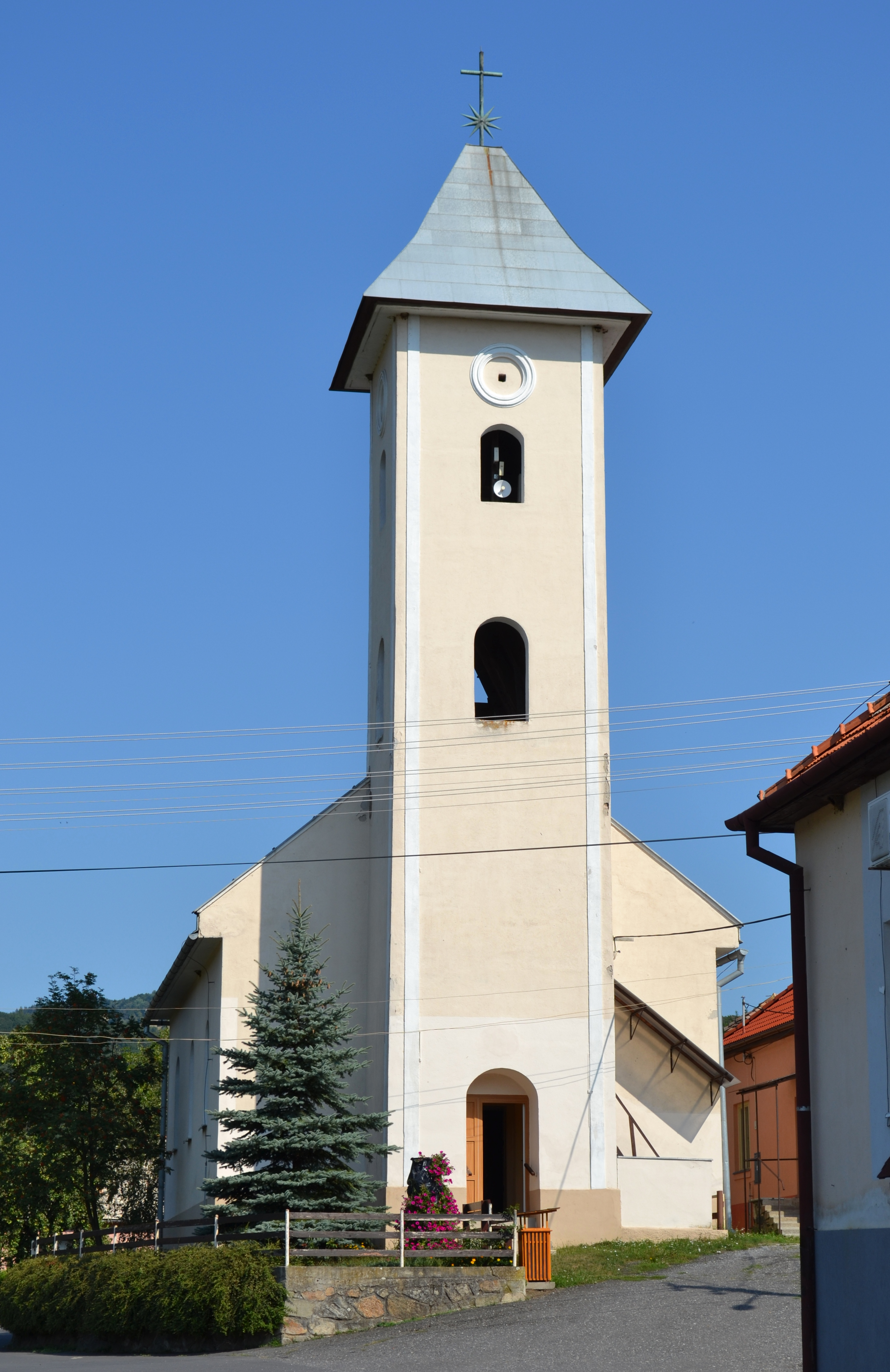 Evanjelický kostol v Hradišti